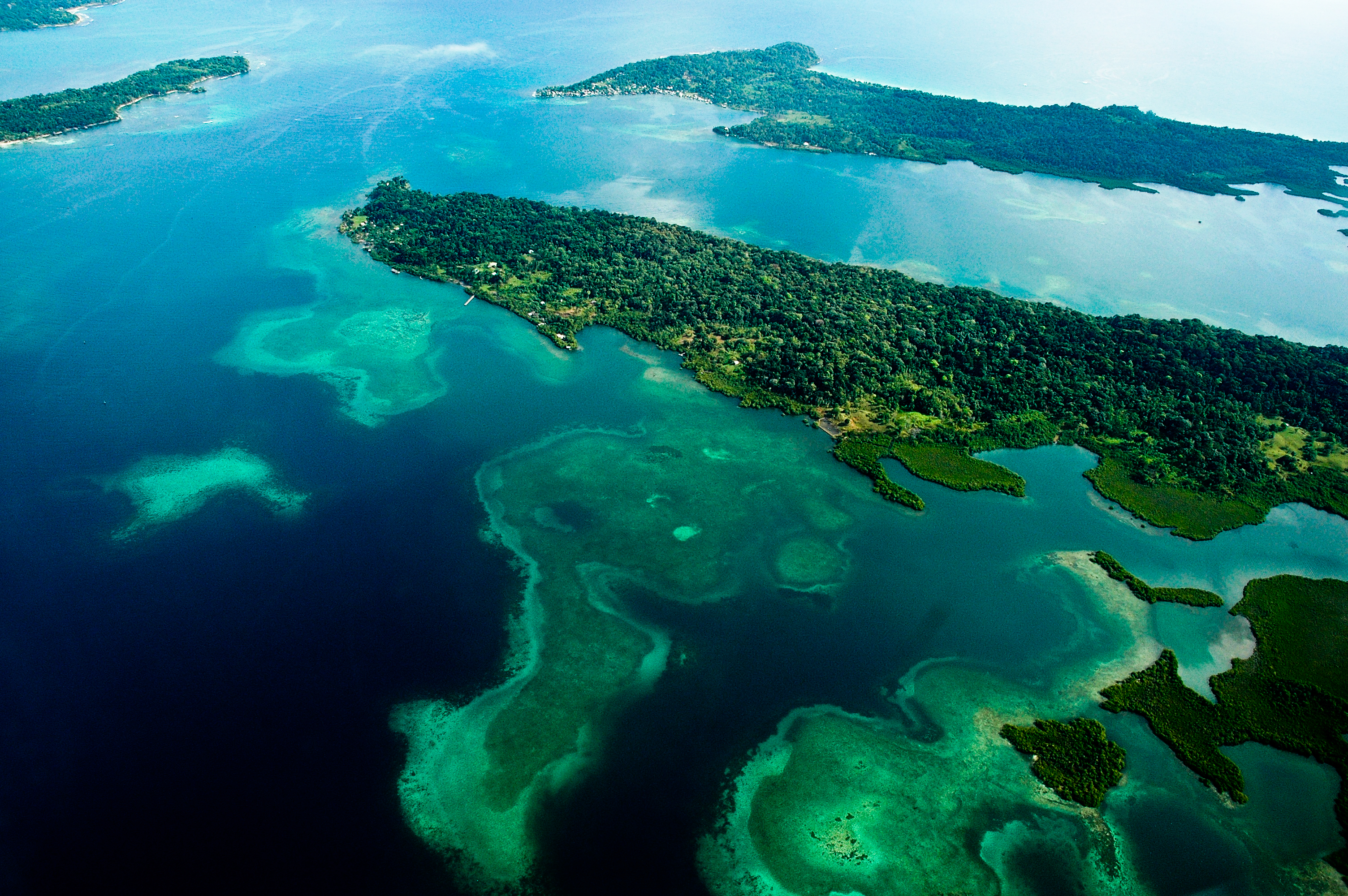 Vista aérea de la Isla Bastimentos, Bocas del Toro